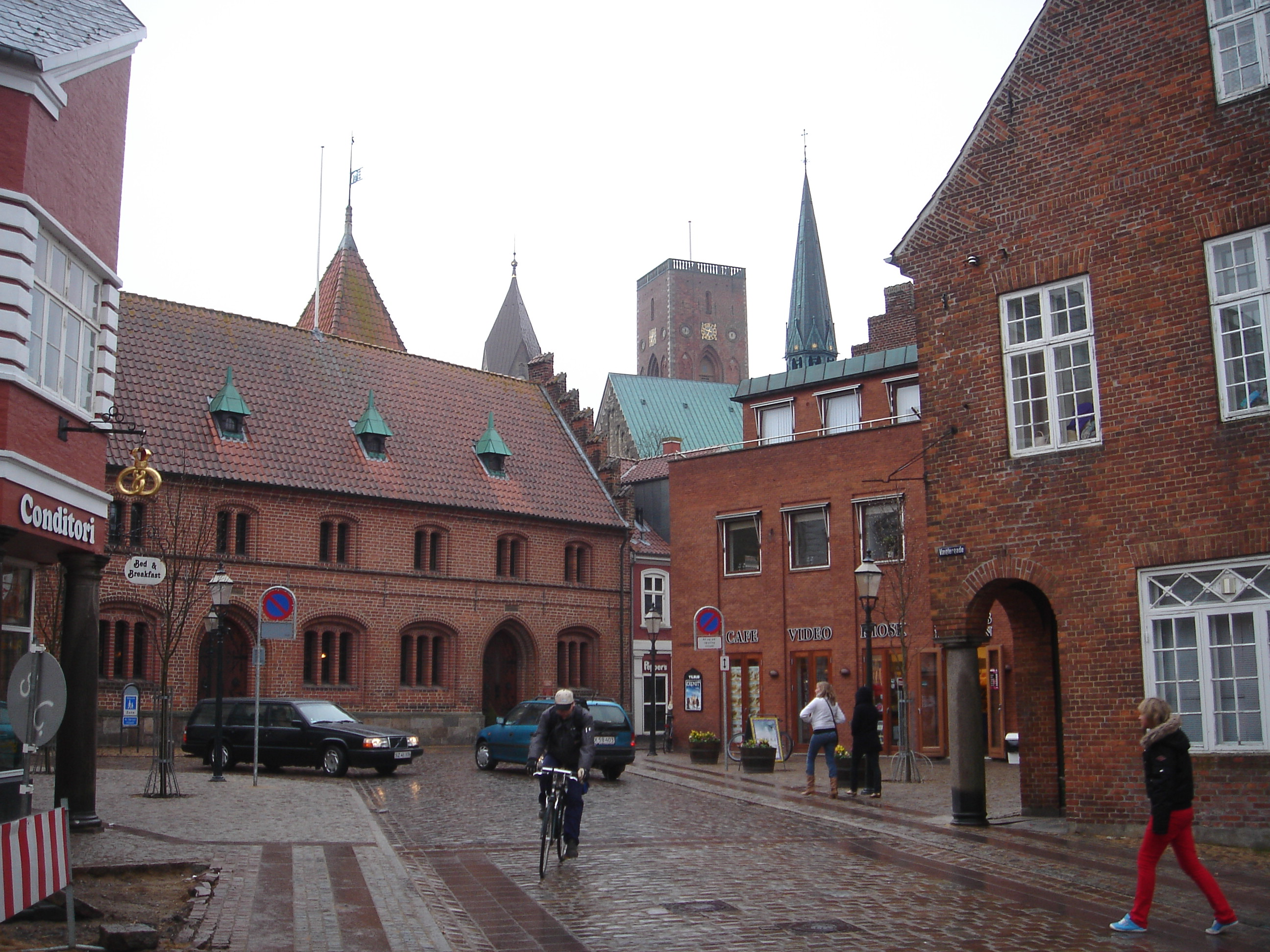 Summary Ansicht der Altstadt von Ribe. Im Hintergrund der Dom, vorne links das Rathaus. Selbst fotografiert von Benutzer:Bordeaux im April 2006Dansk: Von Støckens Plads med Ribes gamle Rådhus til venstre